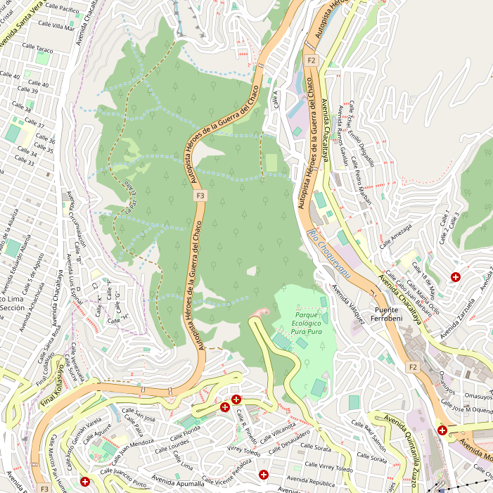 map de ubicación del bosquecillo de Pura Pura en La Paz